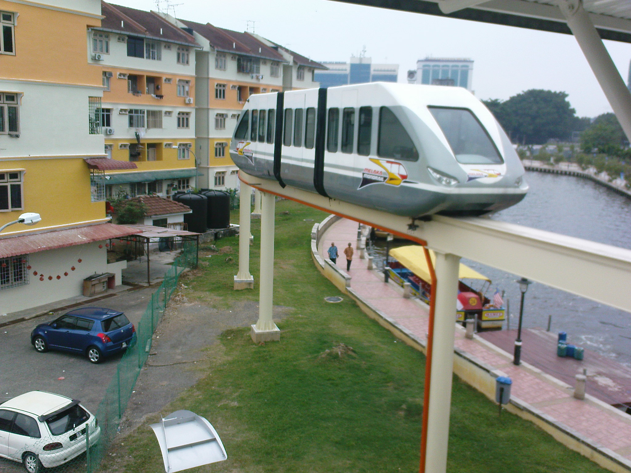 Monorel Melaka